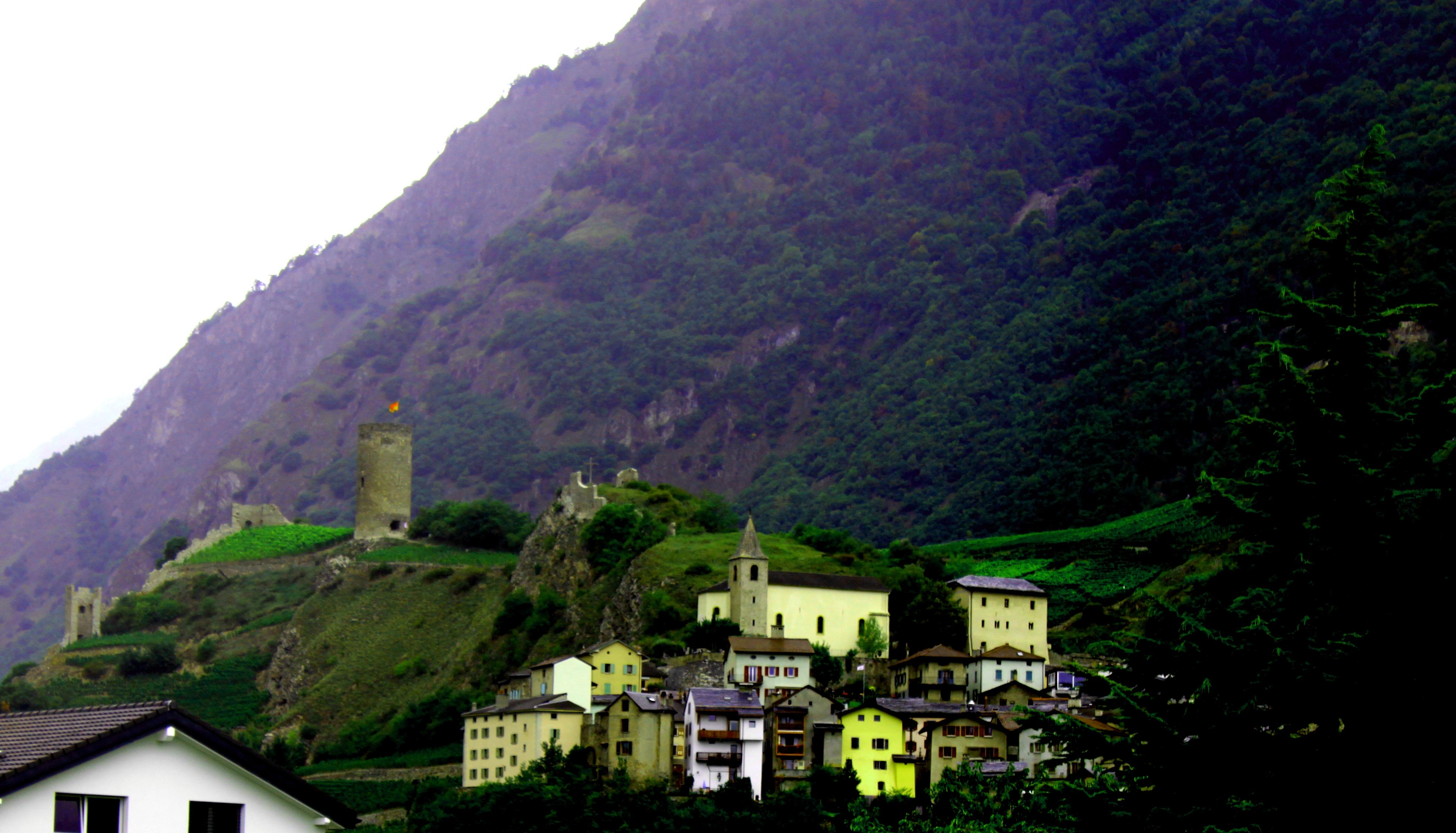 Suisse, canton du Valais, Saillon, Tour Baillard.